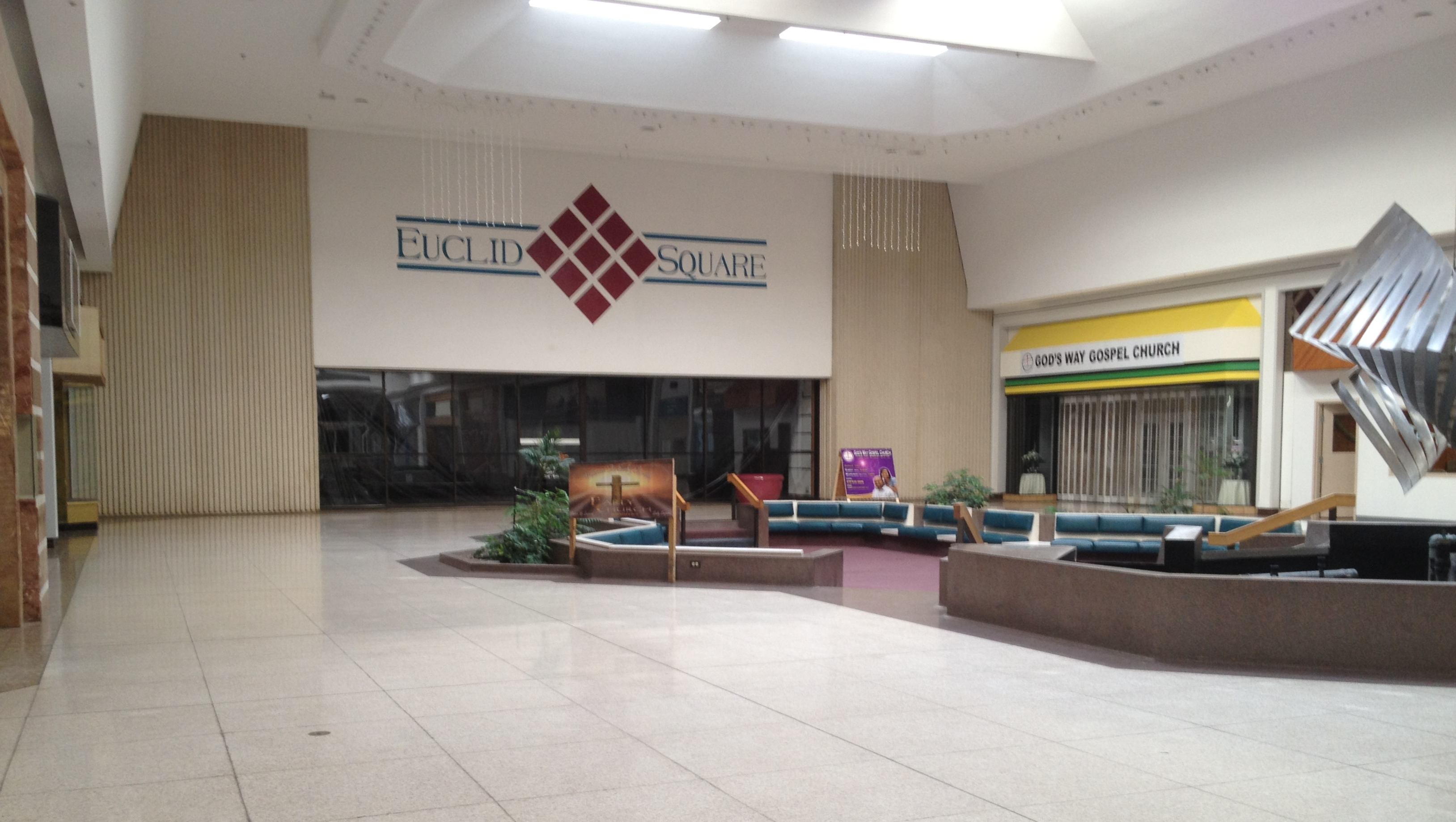 Euclid Square Mall Euclid, OH